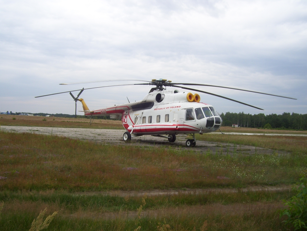 Mi-8S nr 631 (nr fabr. 10631) na płycie lotniska Łódź-Lublinek